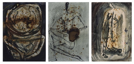 Dílo Miluše Poupětové